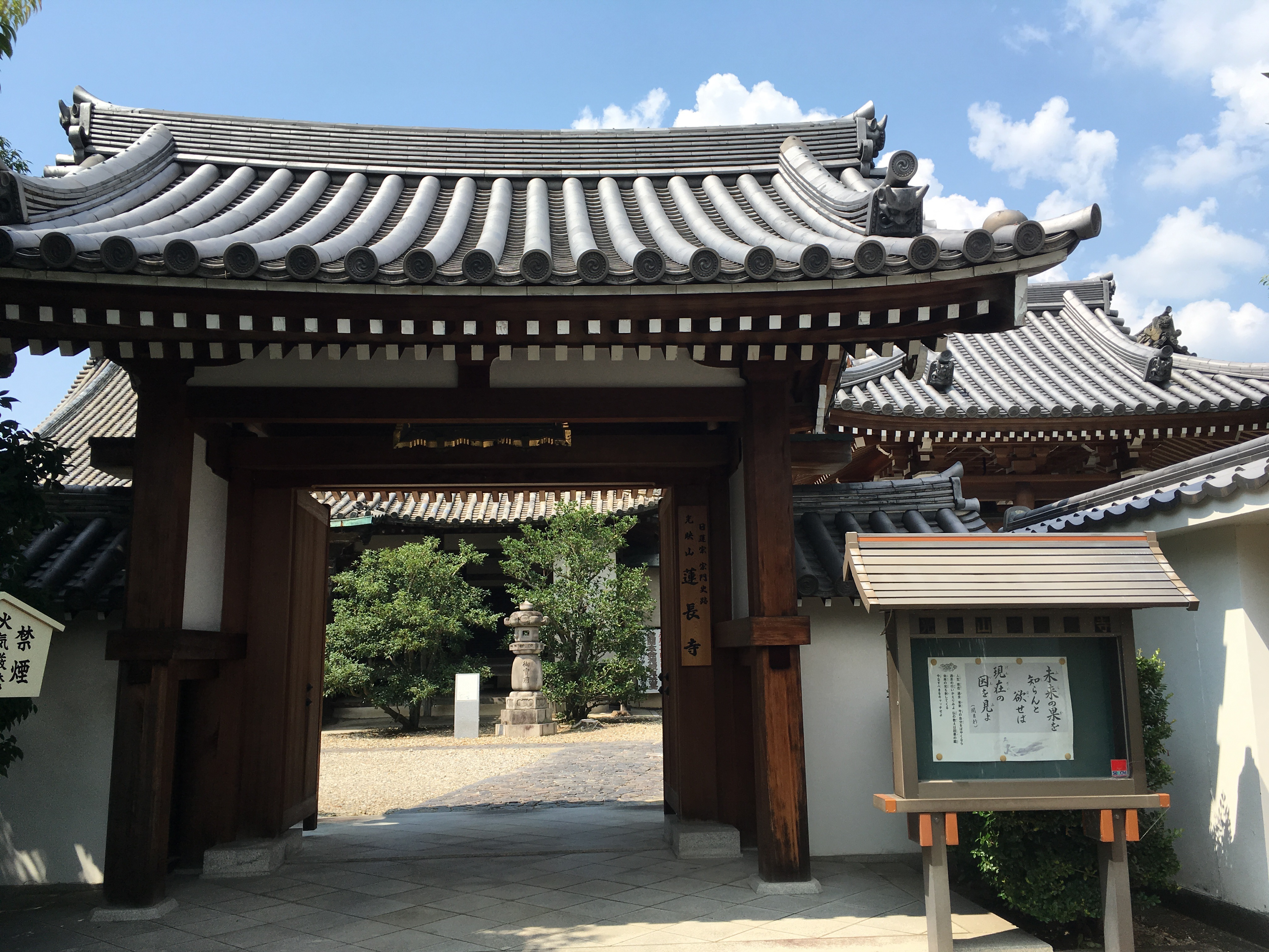 奈良市油阪町 蓮長寺山門